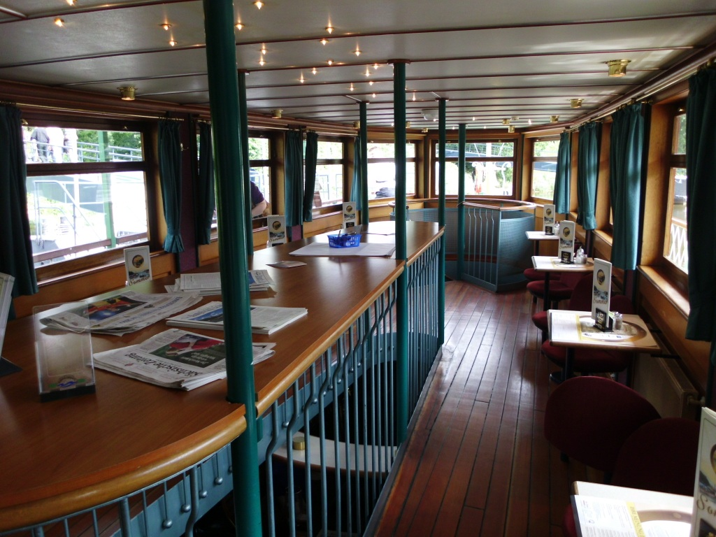 Vorderer Salon des Raddampfers Pillnitz